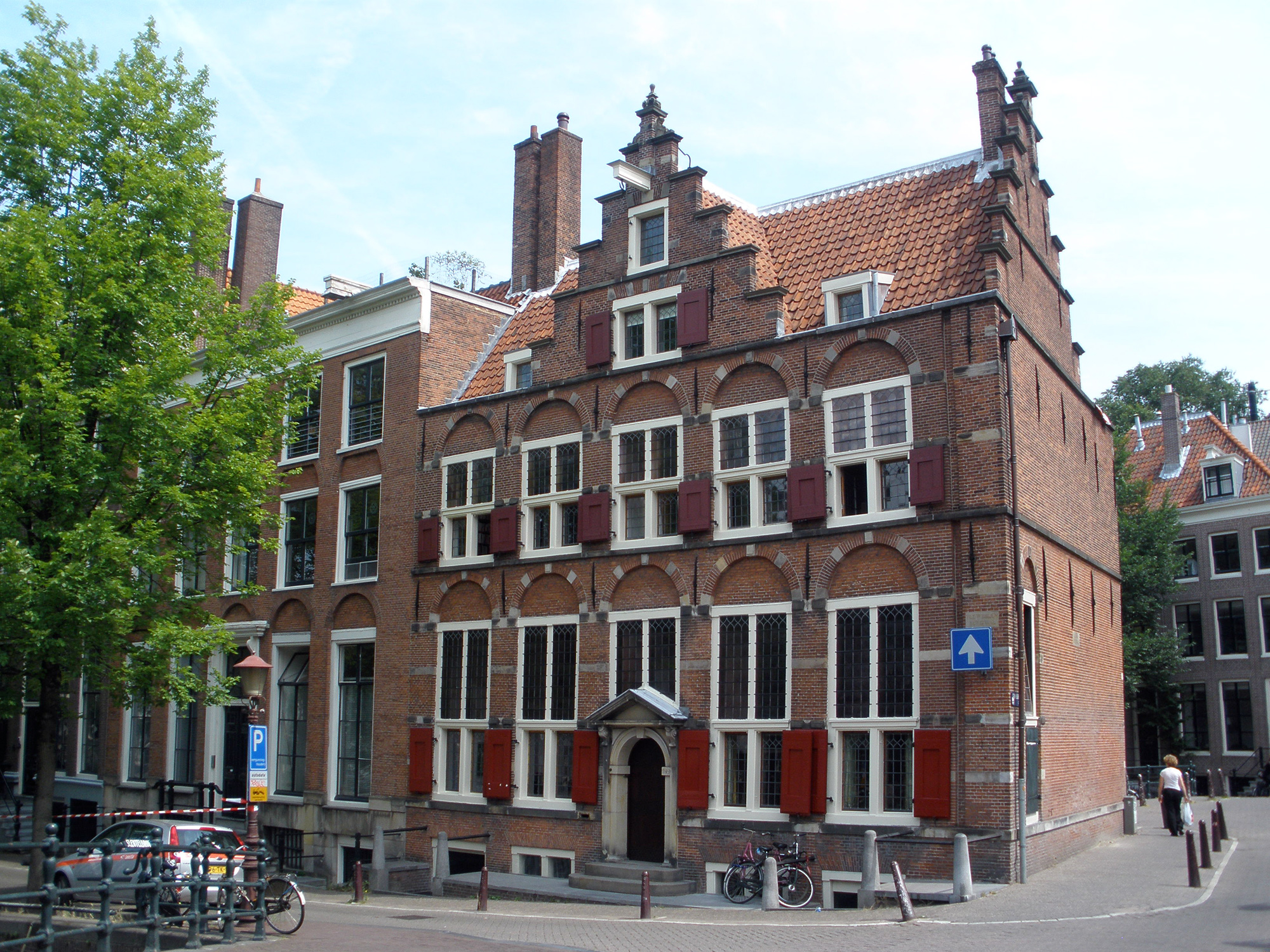 The Huis aan de Drie Grachten ("House on Three Canals") in Amsterdam